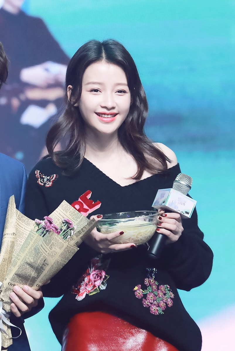 180915 凉生我们可不可以不忧伤 开播发布会